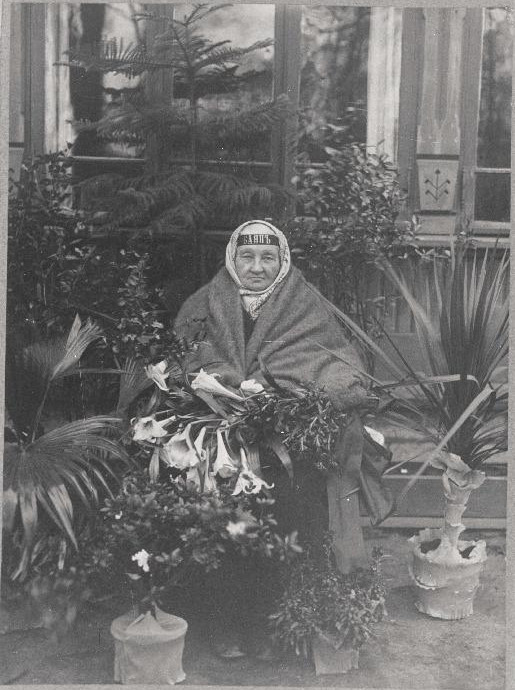 Vene revolutsioonitegelane J. Breško-Breškovskaja Balti jaamas.